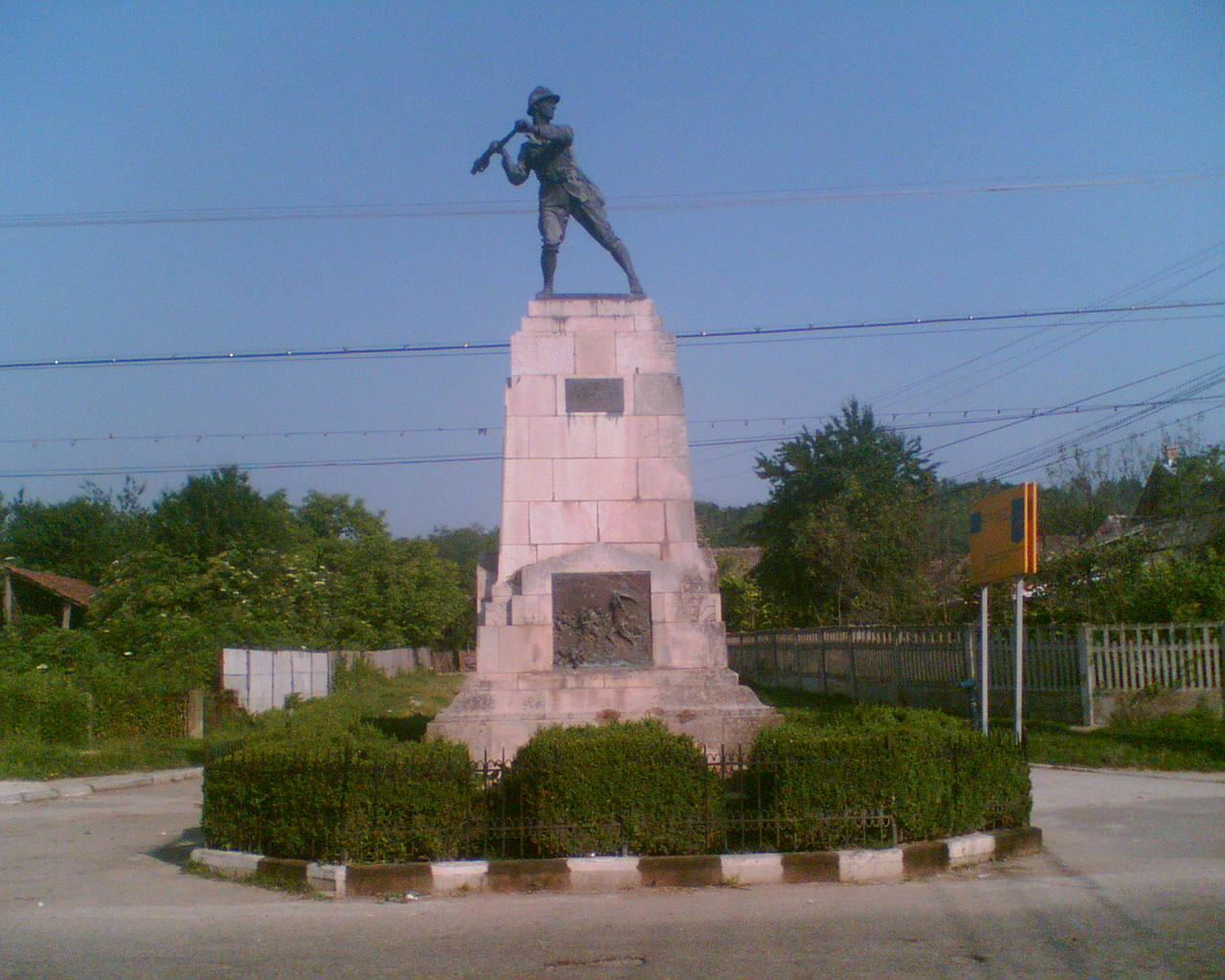 Monumentul dedicat ostasilor cazuti in Primul Razboi Mondial 1916-1918